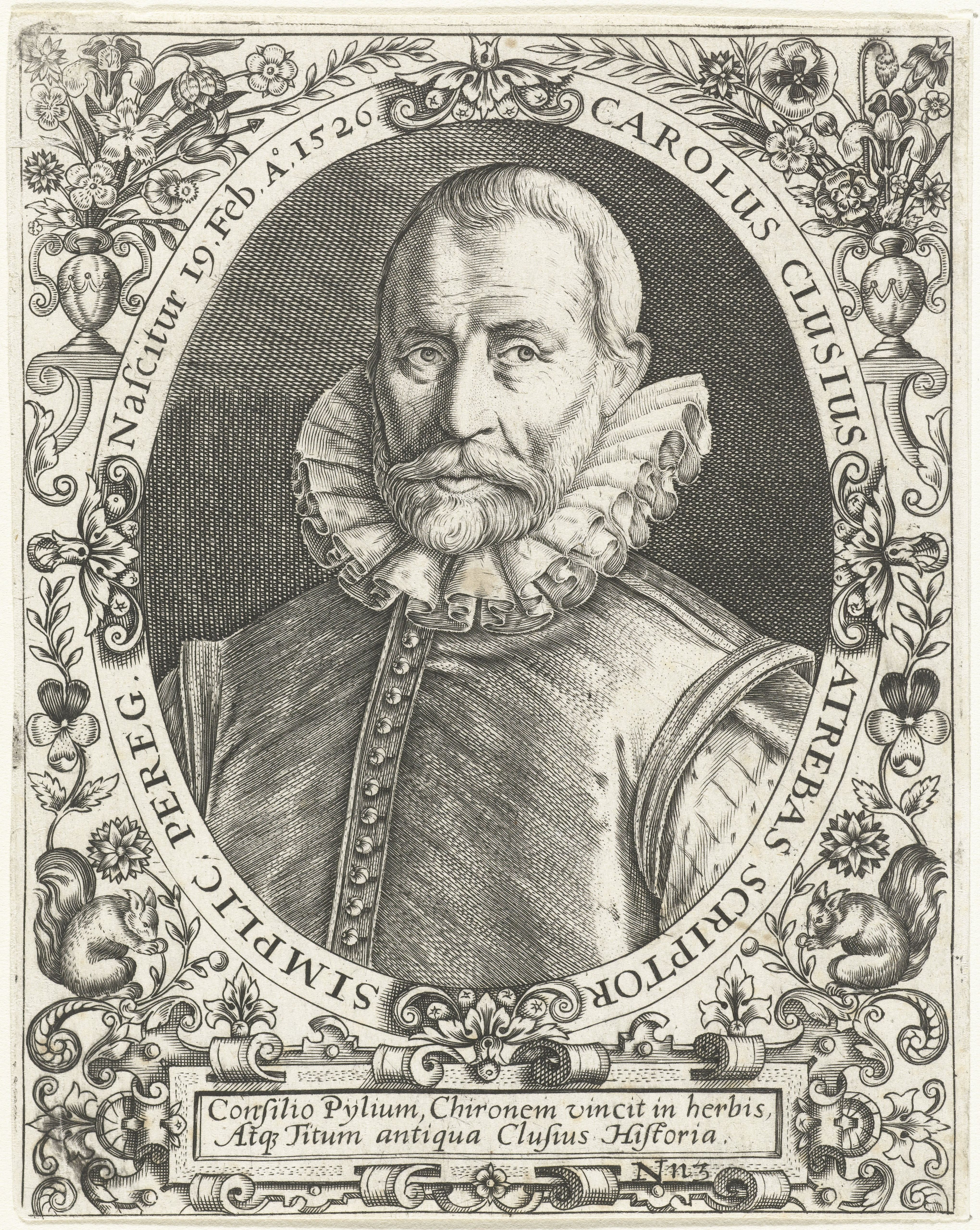 IdentificatieTitel(s): Portret van Carolus ClusiusCarolus Clusius Atrebas (titel op object)Objecttype: prent boekillustratie Objectnummer: RP-P-BI-5113XCatalogusreferentie: Singer 52261Opschriften / Merken: verzamelaarsmerk, verso, gestempeld: Lugt 2228Omschrijving: Portret van Carolus Clusius, in ovaal met randschrift. In een sierlijst met bloemen en eekhoorns. Onder het portret een cartouche met een Latijns vers.VervaardigingVervaardiger: prentmaker: Cornelis Galle (I)naar ontwerp van: Jean Jacques Boissard (mogelijk)Plaats vervaardiging: onbekendDatering: ca. 1597 - ca. 1599 en/of 1669Fysieke kenmerken: gravureMateriaal: papier Techniek: graveren (drukprocedé)Afmetingen: plaatrand: h 140 mm × b 100 mmToelichtingGemaakt voor: J.J. Boissard, Icones virorum illustrium doctrina &c eruditione praestanti um contines. Frankfurt am Main: de Bry, 1597-1599. Opnieuw gebruikt in: J.J.Boissard, Bibliotheca chalcographica, hoc est Virtute et eruditione clarorum Virorum Imagines. Heidelberg: Clemens Ammon, 1669. Dl. 1-5 (te herkennen aan de toegevoegde signatuur in de rechter onderhoek: 2N3).OnderwerpWie: Carolus ClusiusVerwerving en rechtenVerwerving: overdracht van beheer 1816Copyright: Publiek domein